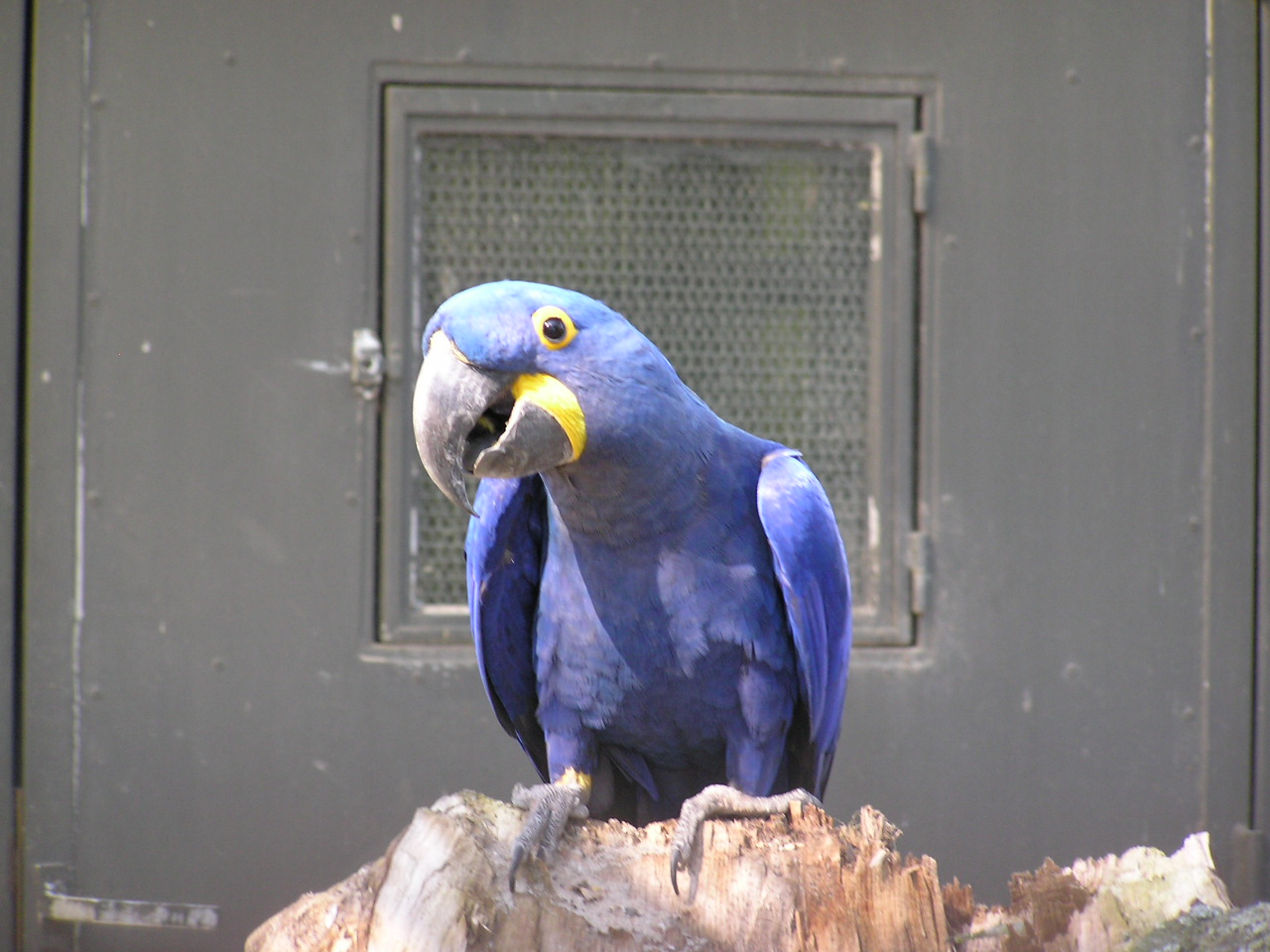 Anodorhynchus hyacinthinus